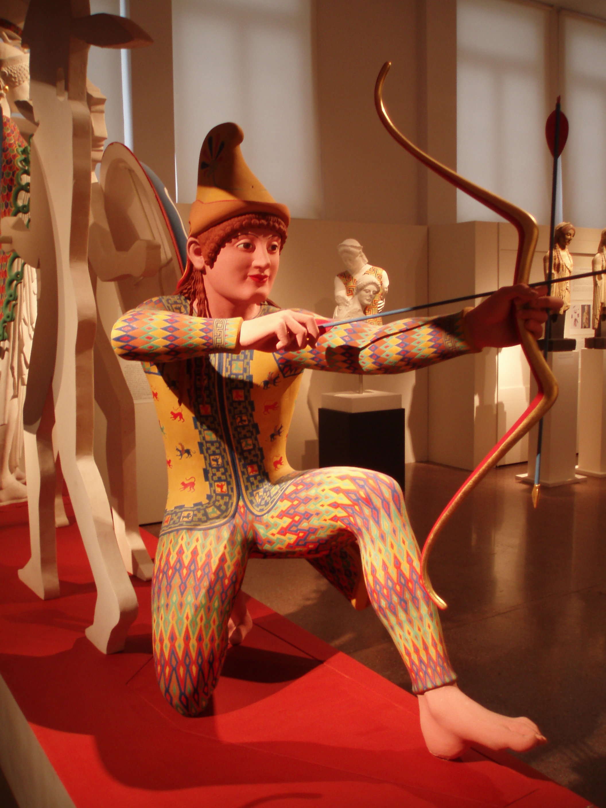 Restitution du décor polychrome d'un archer troyen («Pâris») provenant du fronton Ouest temple d'Athéna Aphaia à Égine. Vers 490 av. J.-C. Exposition « Bunte Götter » dans la version montrée à Athènes. Etude : Vinzenze Brinkmann et Hermann Pflug. Peinture : Ulrike Koch-Brinkmann. Arc et flèches : Sylvia Kellner et Ina Kleiß. Boucles de cheveux : Olaf Herzog. Original : Munich, Staatliche Antikensammlungen und Glyptothek.